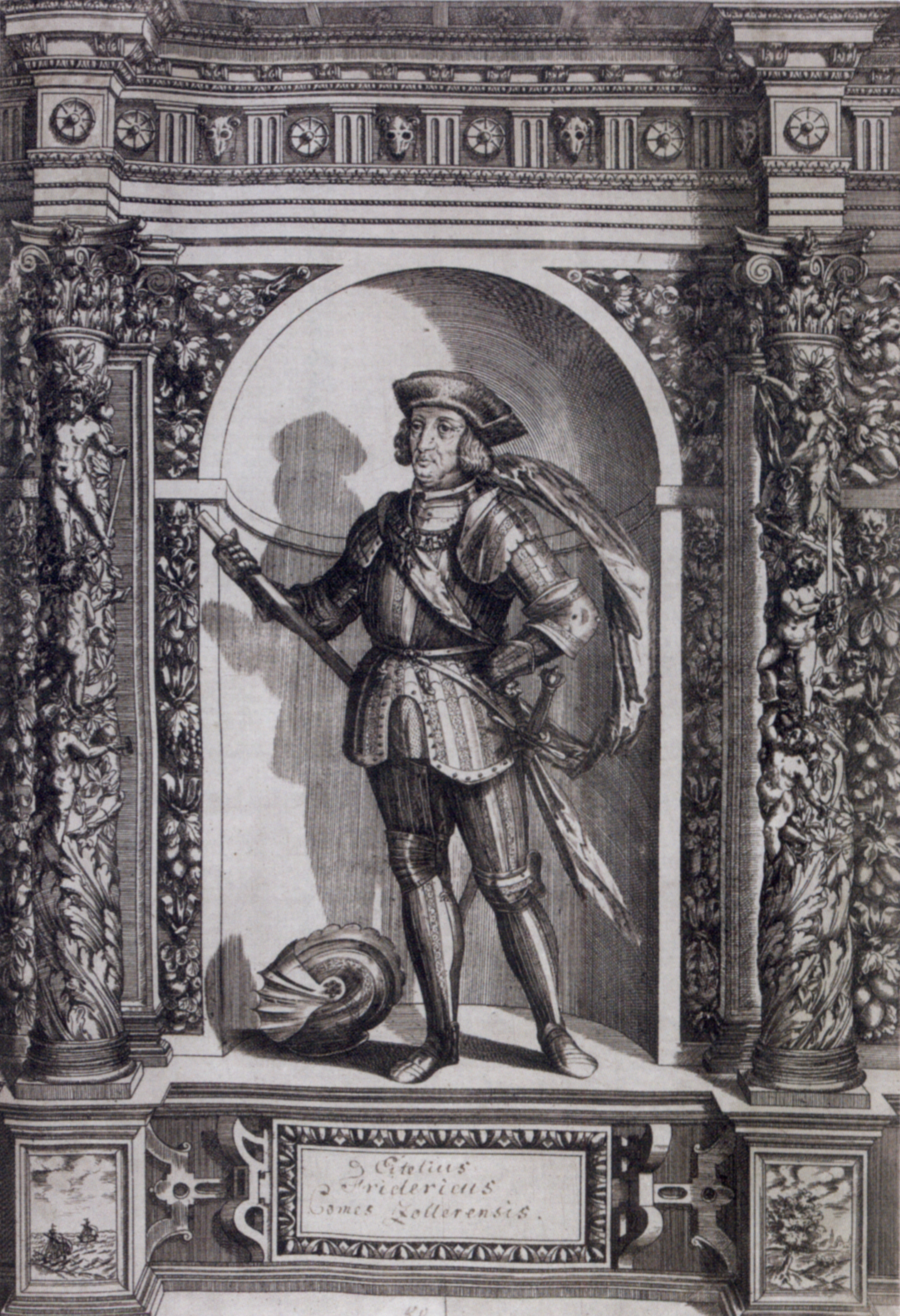 Eitelfriedrich von Zollern in Rüstung, Stich aus Jakob Schrenck von Notzings Heldenbuch (gestochen von Dominicus Custos nach Zeichnungen von Giovanni Battista Fontana), Exemplar der Fürstlichen Kunstsammlungen Waldburg-Wolfegg